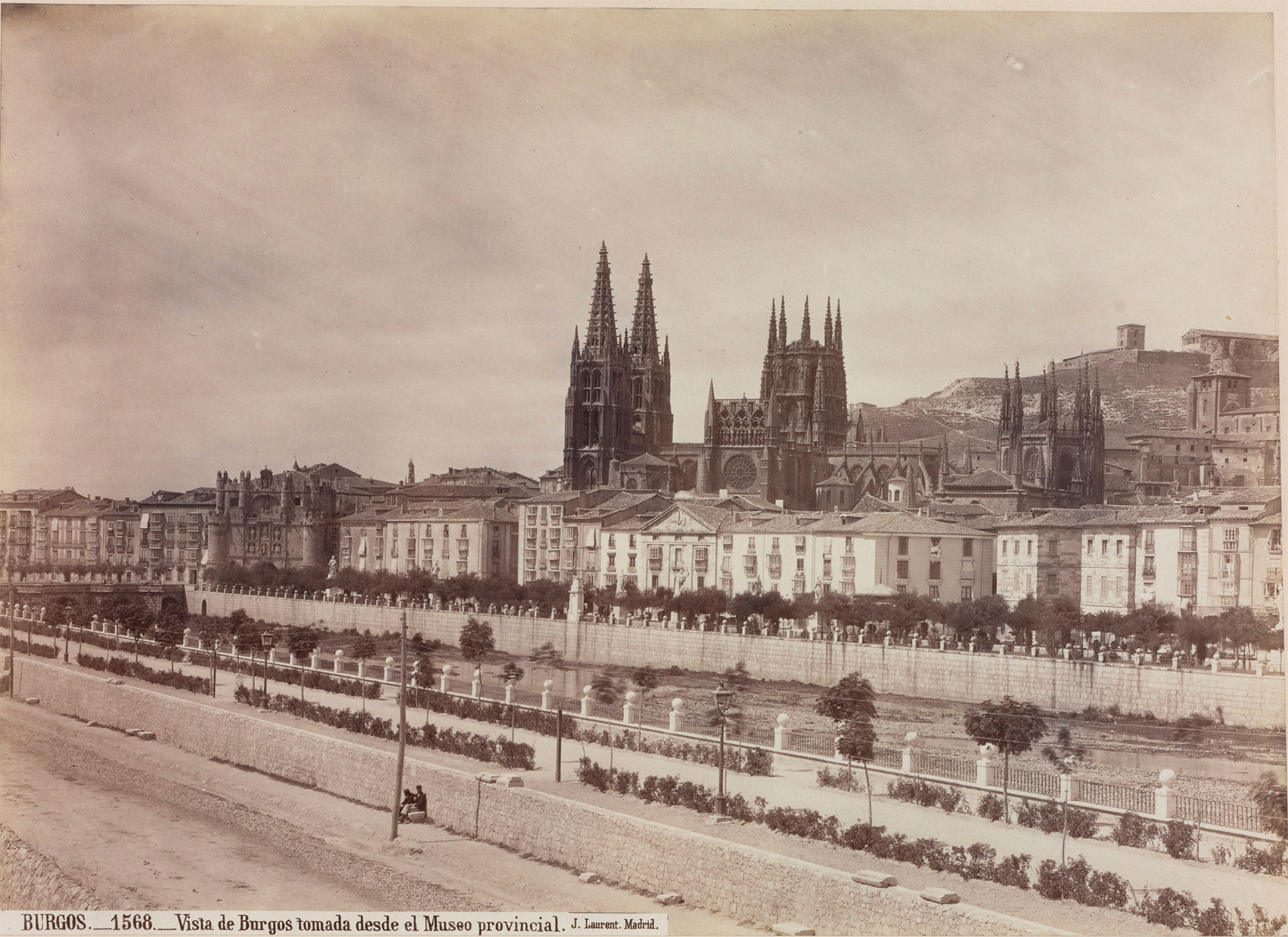 Burgos ca. 1870